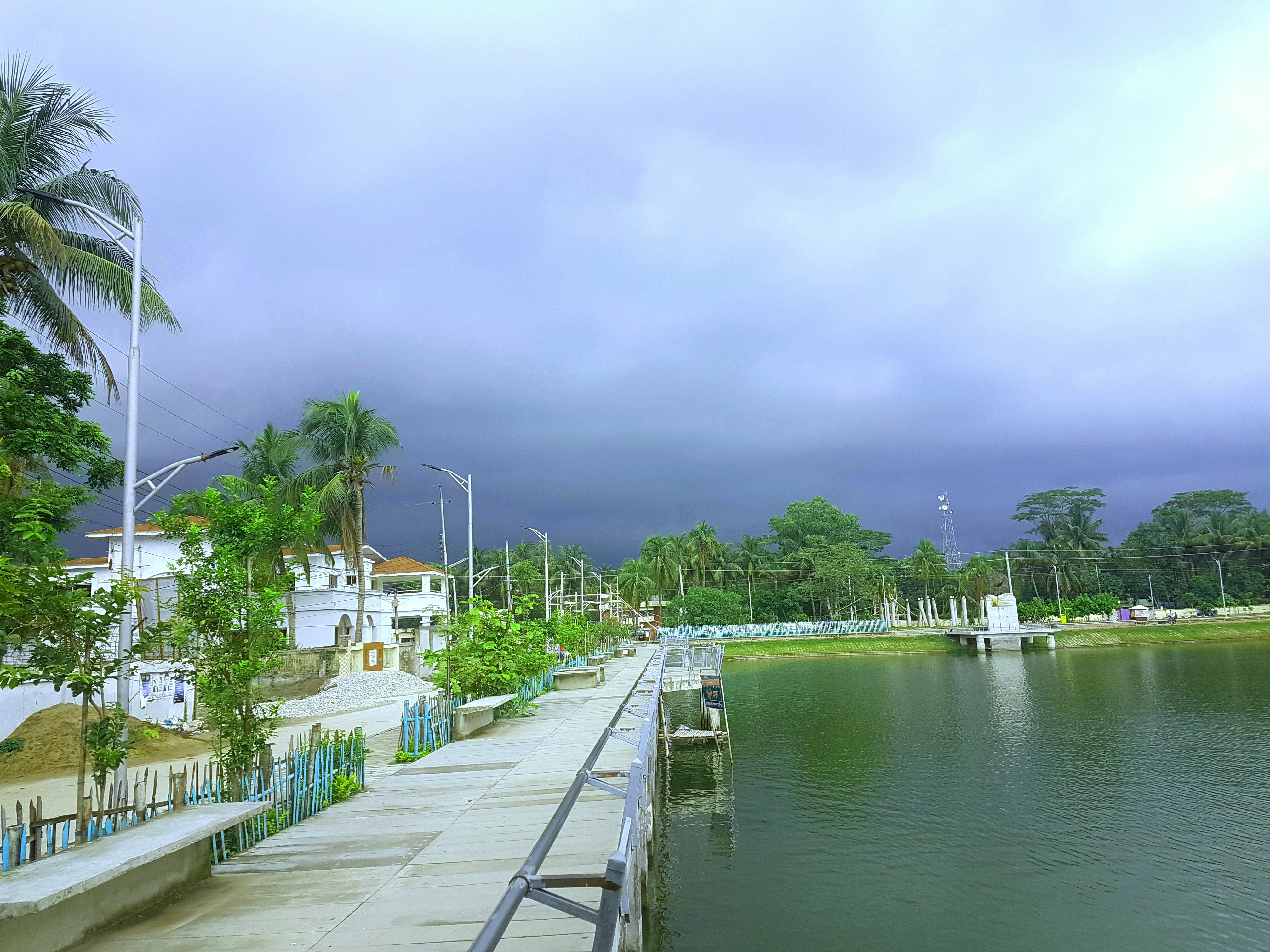 প্রশাসন সূত্রে জানা যায়, ১৮৮৪ সালে শকুনি লেকটি খনন করা হয়। দীর্ঘদিন অযত্ন-অবহেলায় পড়ে ছিল লেকটি। পরে ২০১৩ সালে ২২ কোটি টাকা ব্যয়ে এর সৌন্দর্যবর্ধনের কাজ শুরু হয়। শকুনি লেকটিকে আরও সুন্দর করে তুলতে নেওয়া হয়েছে নতুন কয়েকটি প্রকল্প। এর মধ্যে শকুনি লেকের একটি অংশে শিশুদের বিনোদনের কথা মাথায় রেখে গড়ে তোলা হয়েছে শিশুপার্ক। শহরের কেন্দ্রস্থলে অবস্থিত লেকটির দৈর্ঘ্য প্রায় এক কিলোমিটার।